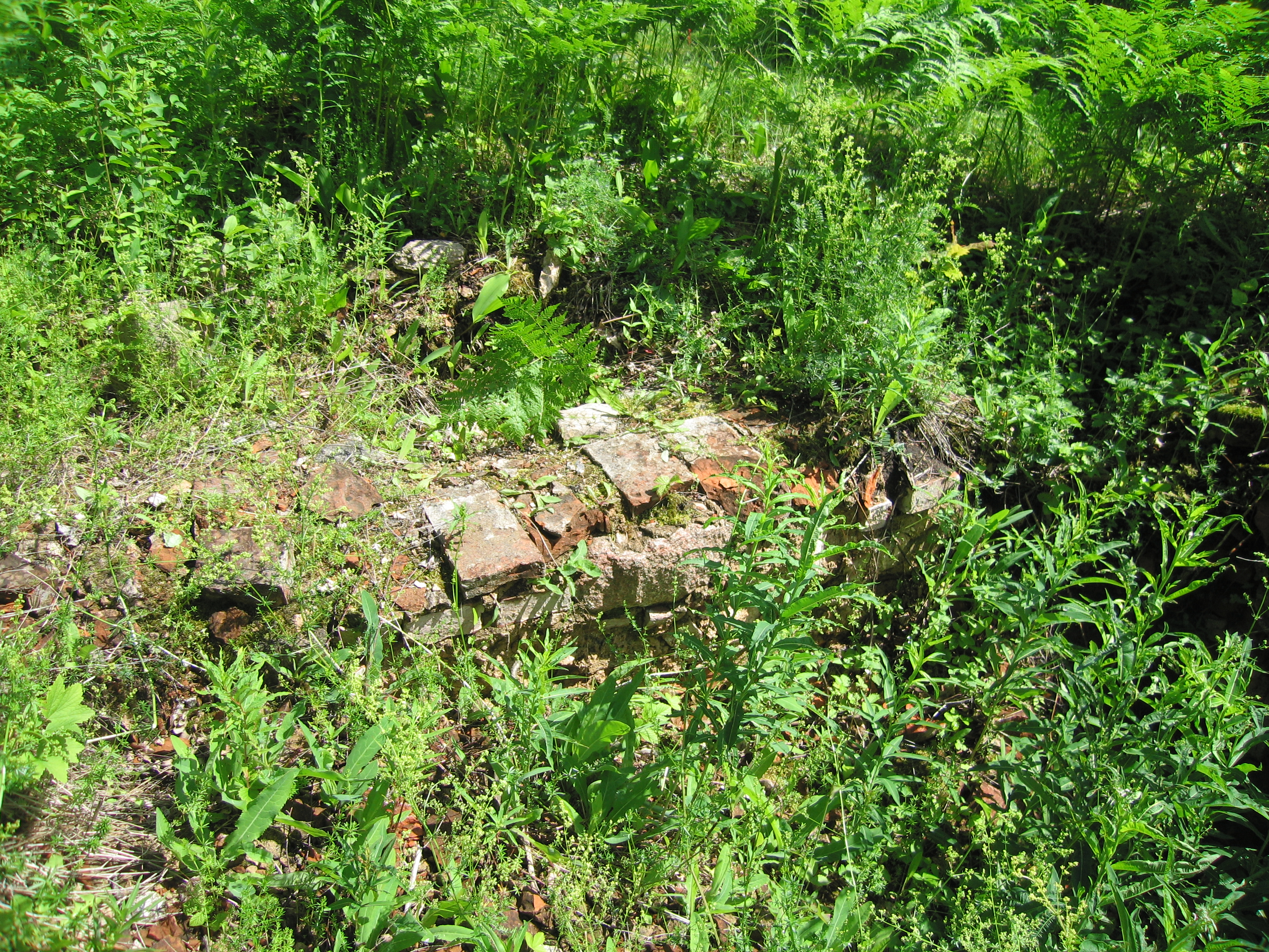 Kabelivaremed kalmistul